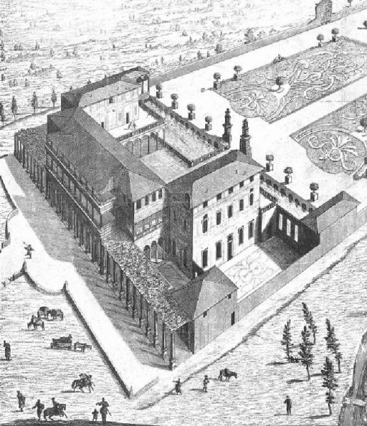 Marc'Antonio Dal Re (1697-1766), Villa Simonetta. Incisione da Ville di delizia o siano palagi camparecci nello Stato di Milano, Milano, 1726.